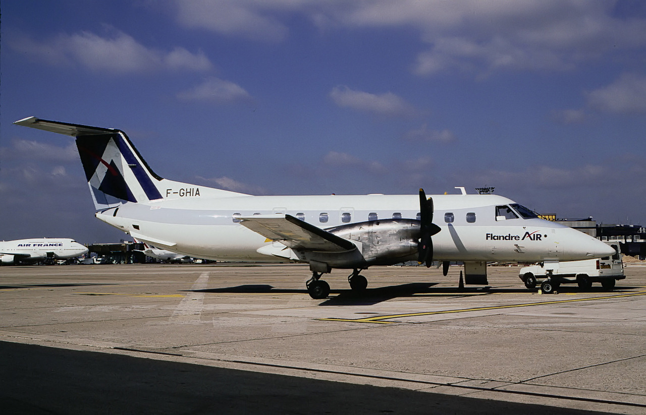 Een Embraer 120 Brasilia van Flandre Air